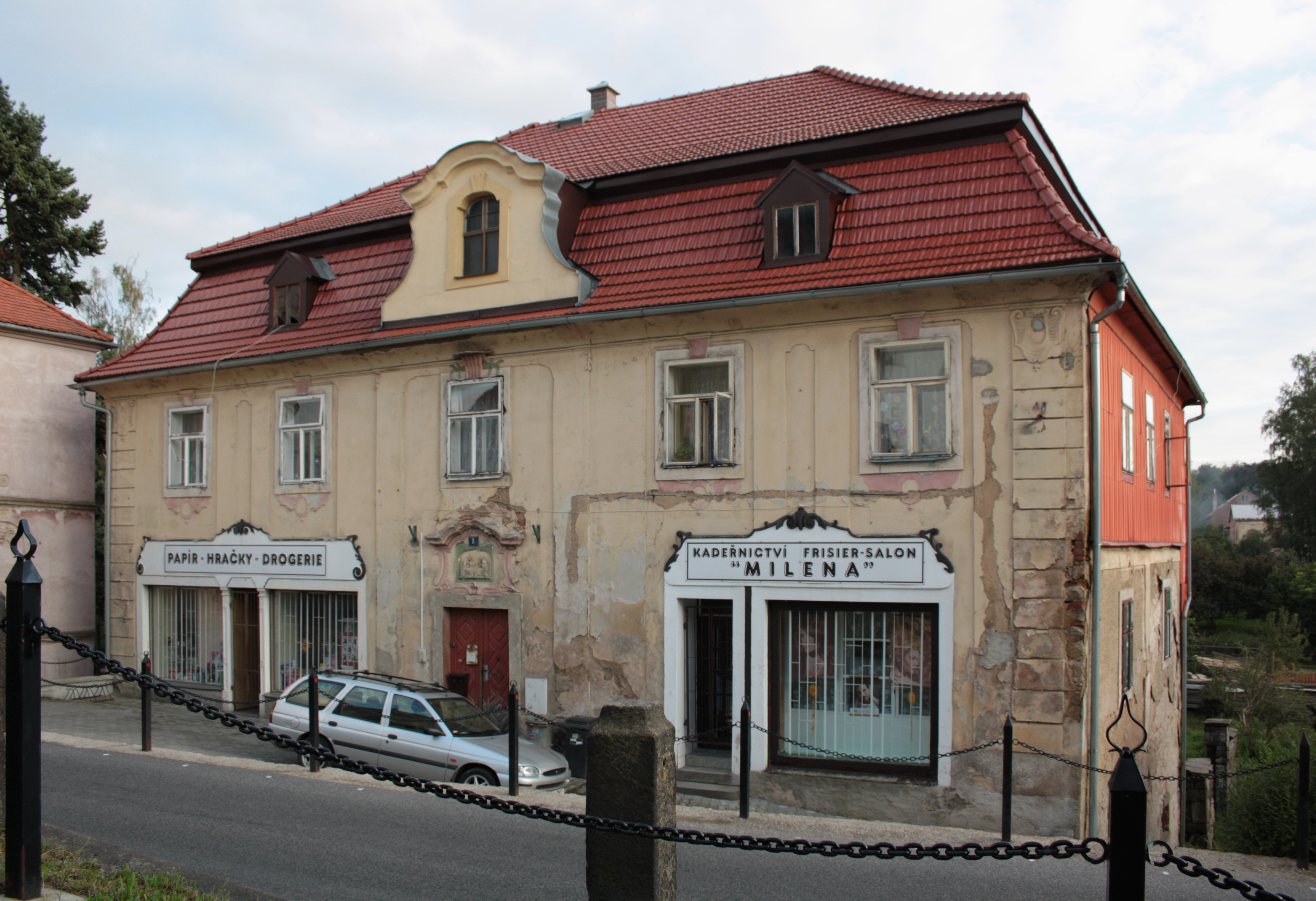 Mikulášovice